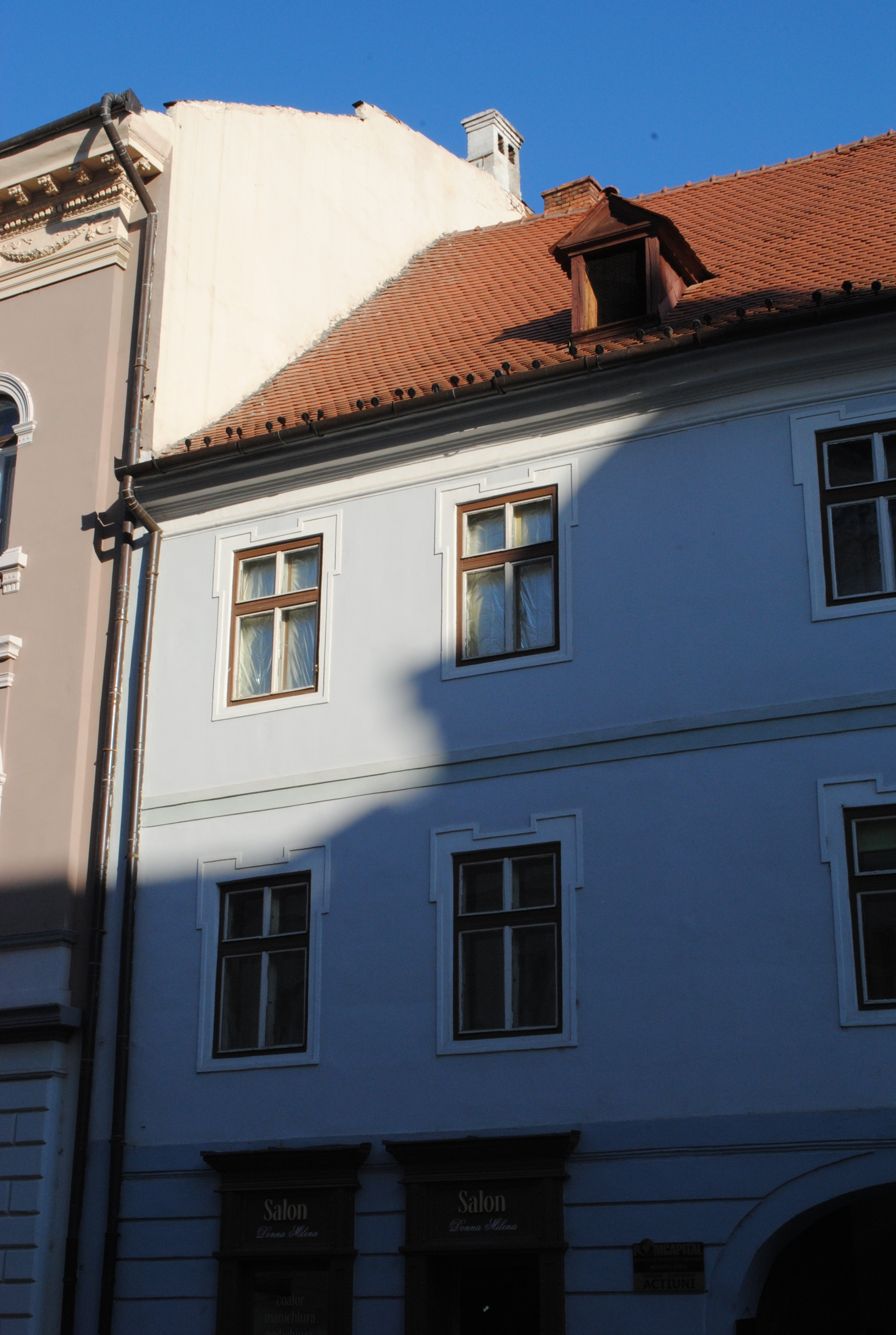 Casă, sec. XV - XVI, sec. XVIII, sf. sec. XIX